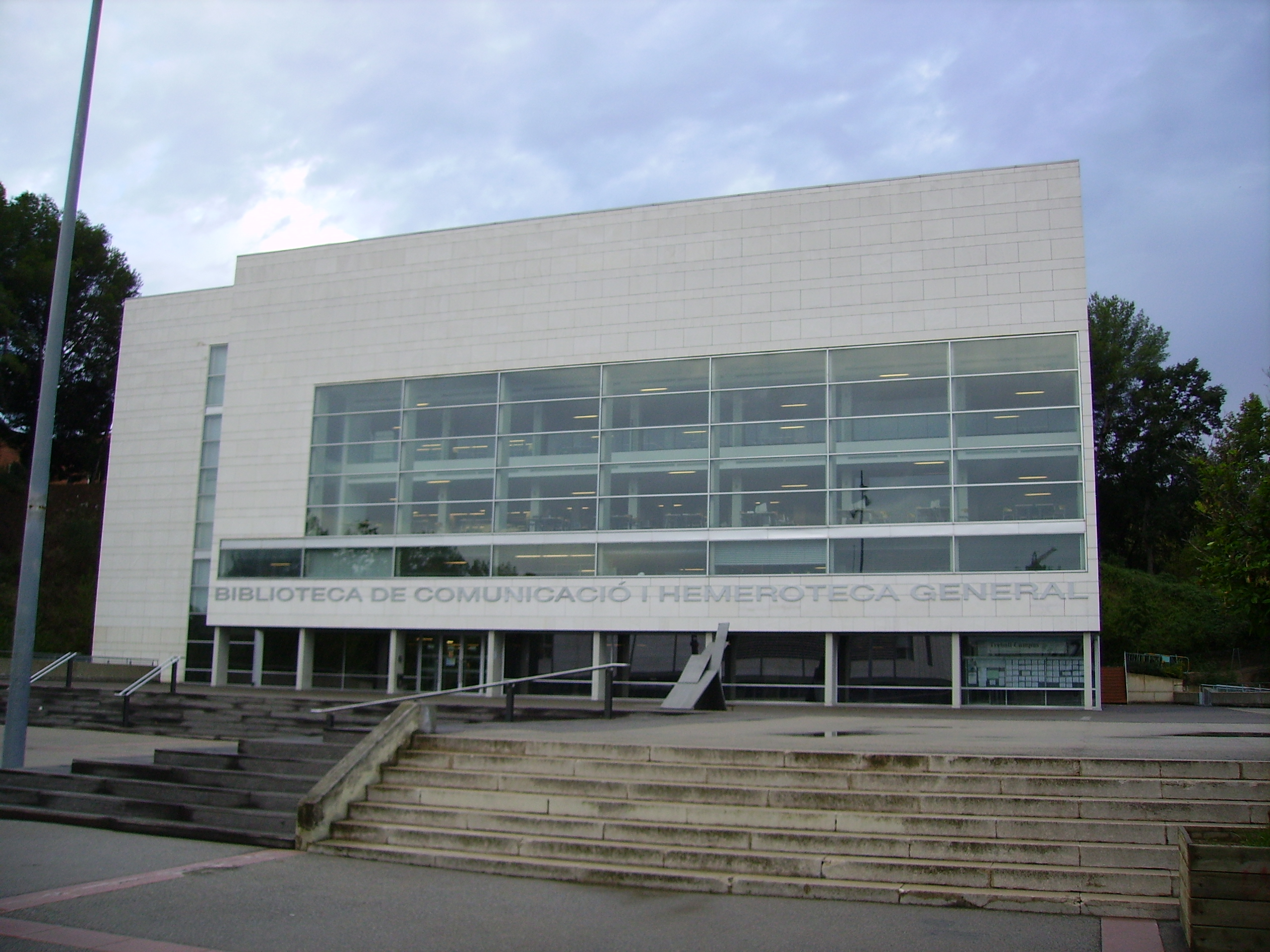 Biblioteca de Comunicaciói Hemeroteca Geneal (UAB), Bellaterra, Catalunya.